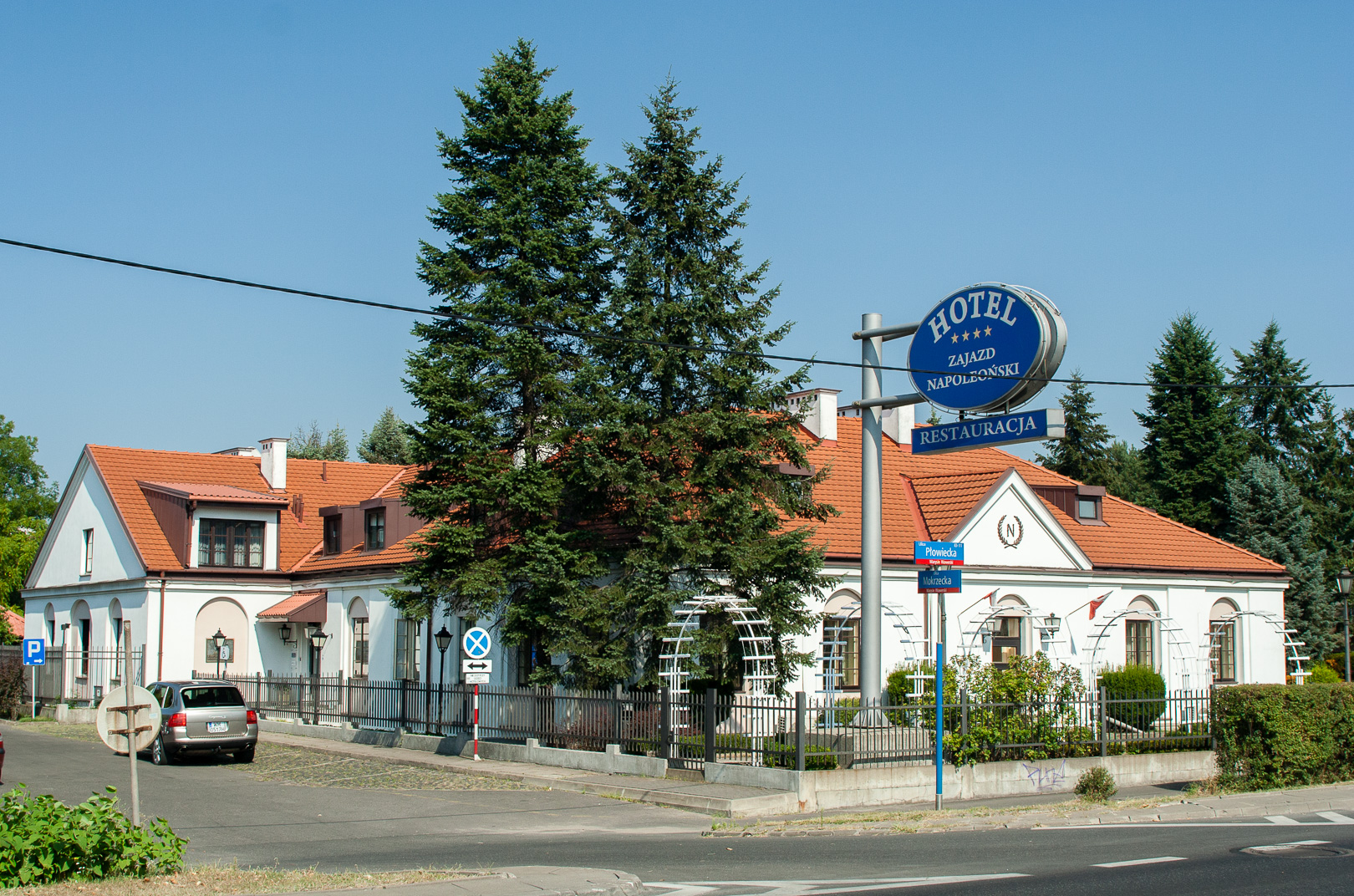 Dawna Karczma Wawerska (Austeria Wawerska) z 1 poł. XIX w, obecnie Zajazd Napoleoński. Styl klasycystyczny, nr rejestru 645, z dnia 01.07.1965. Warszawa, Wawer, ul. Płowiecka 83